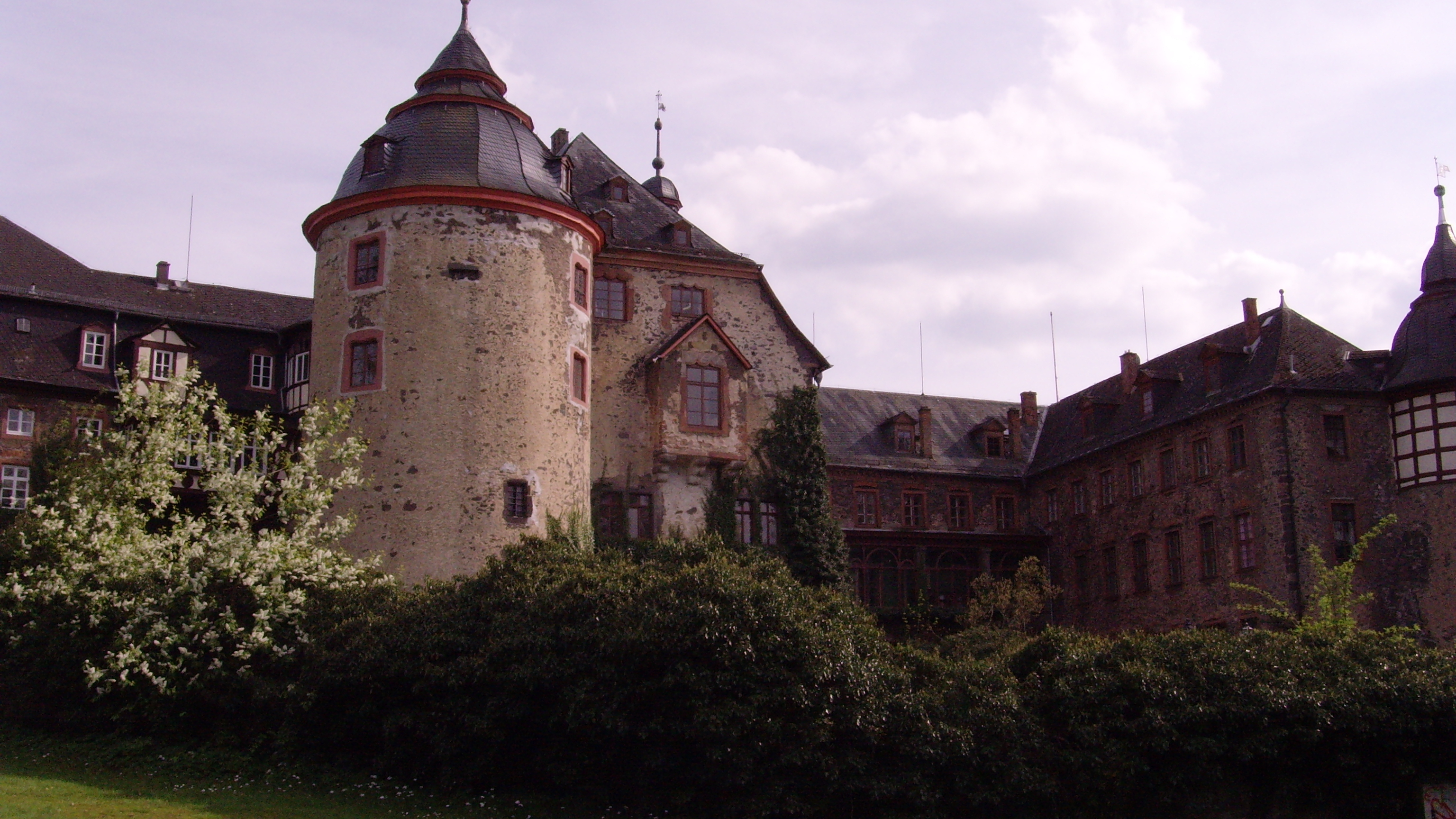 Schloss der Grafen zu Solms-Laubach, Laubach (Hessen), vom Schlosspark gesehen